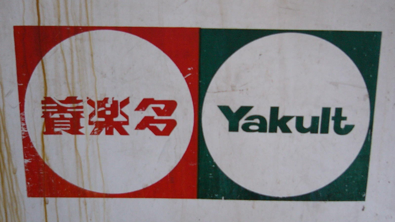 大同公司於1995年製造的冷凍櫃TR-270N機身側面的養樂多1990年代商標。